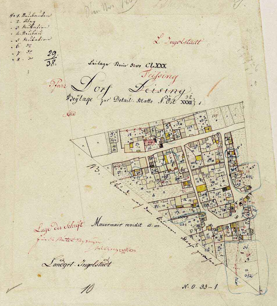 Historische Ortskarte von Theißing bei Großmehring von 1813. Maßstab: 1:2500.